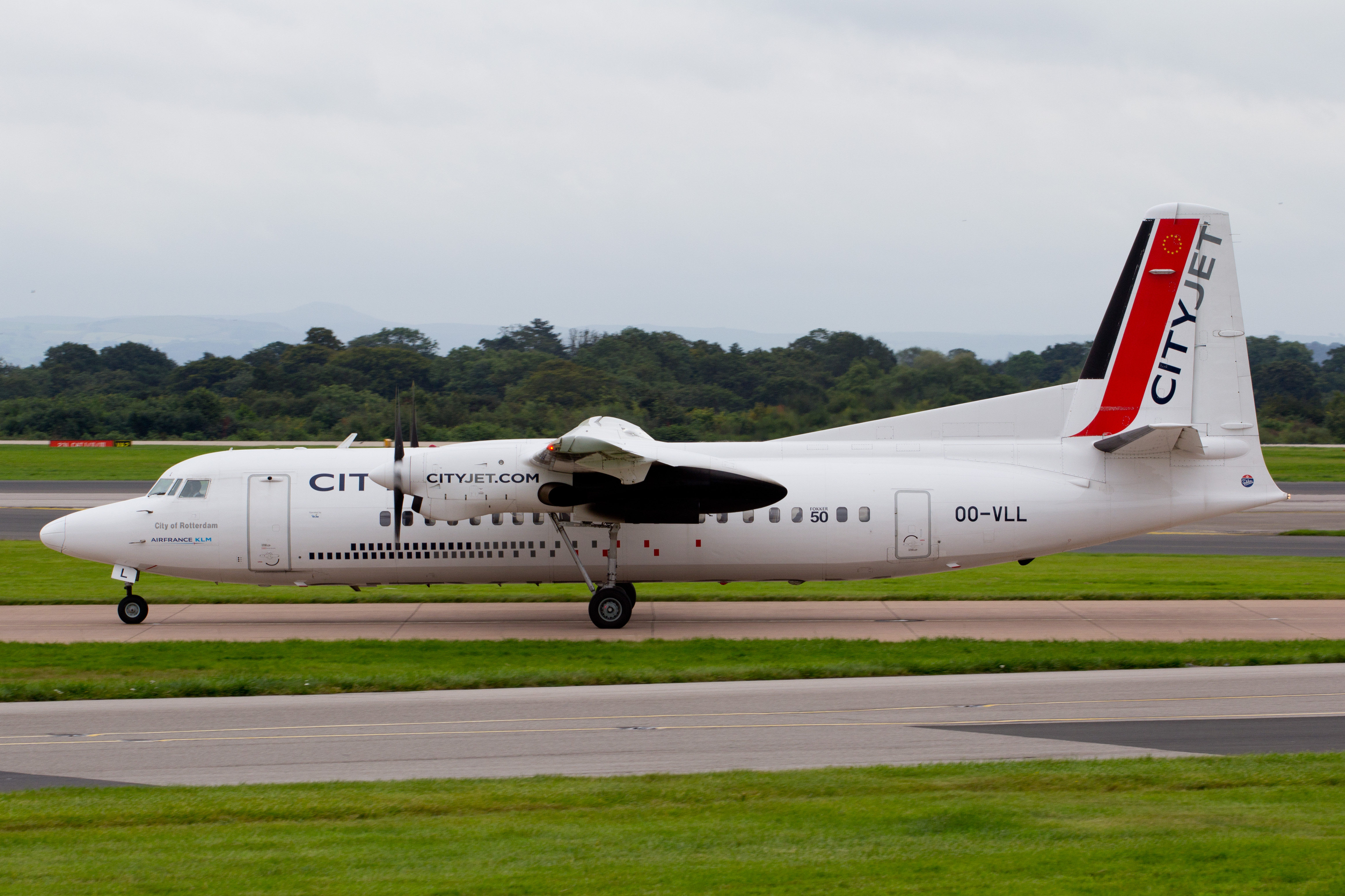 Manchester 27/8/12